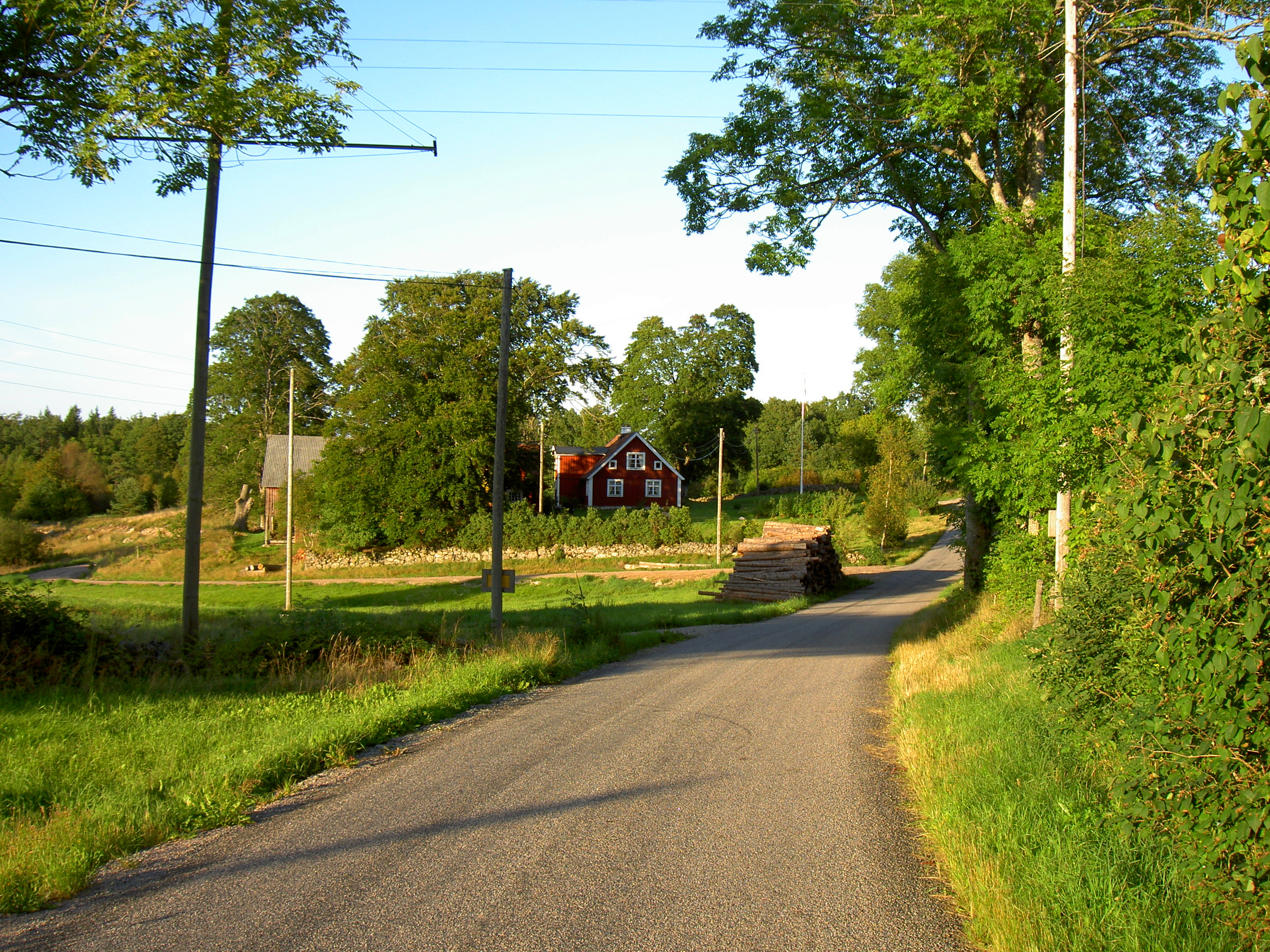 Råaköp med landsvägen till Torpa